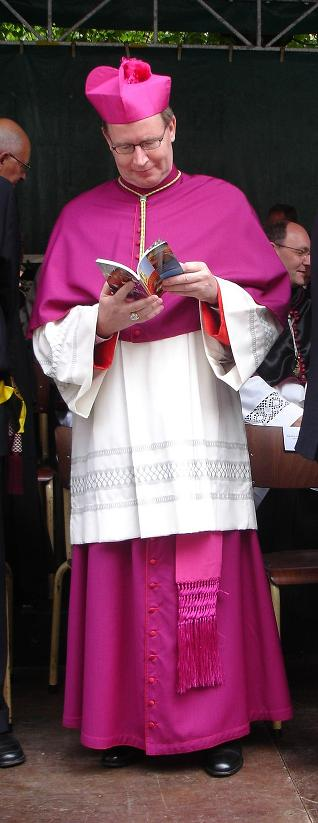 Zijne Hoogwaardige Excellentie Monseigneur Eijk, Bisshop of Groningen